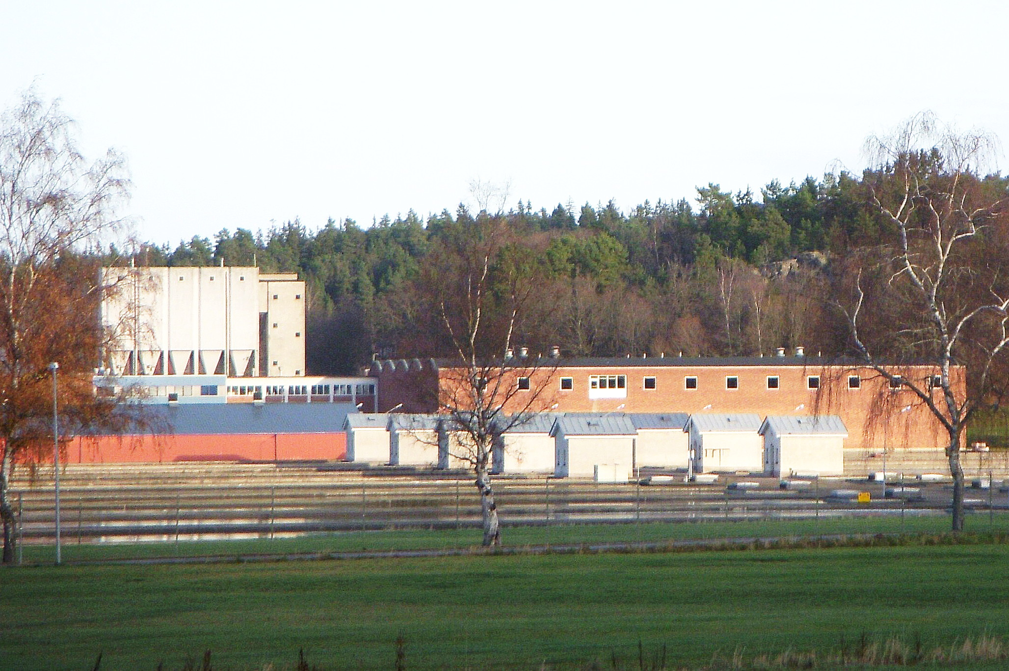 Norsborg vattenverk, bassänger för långsamfilter